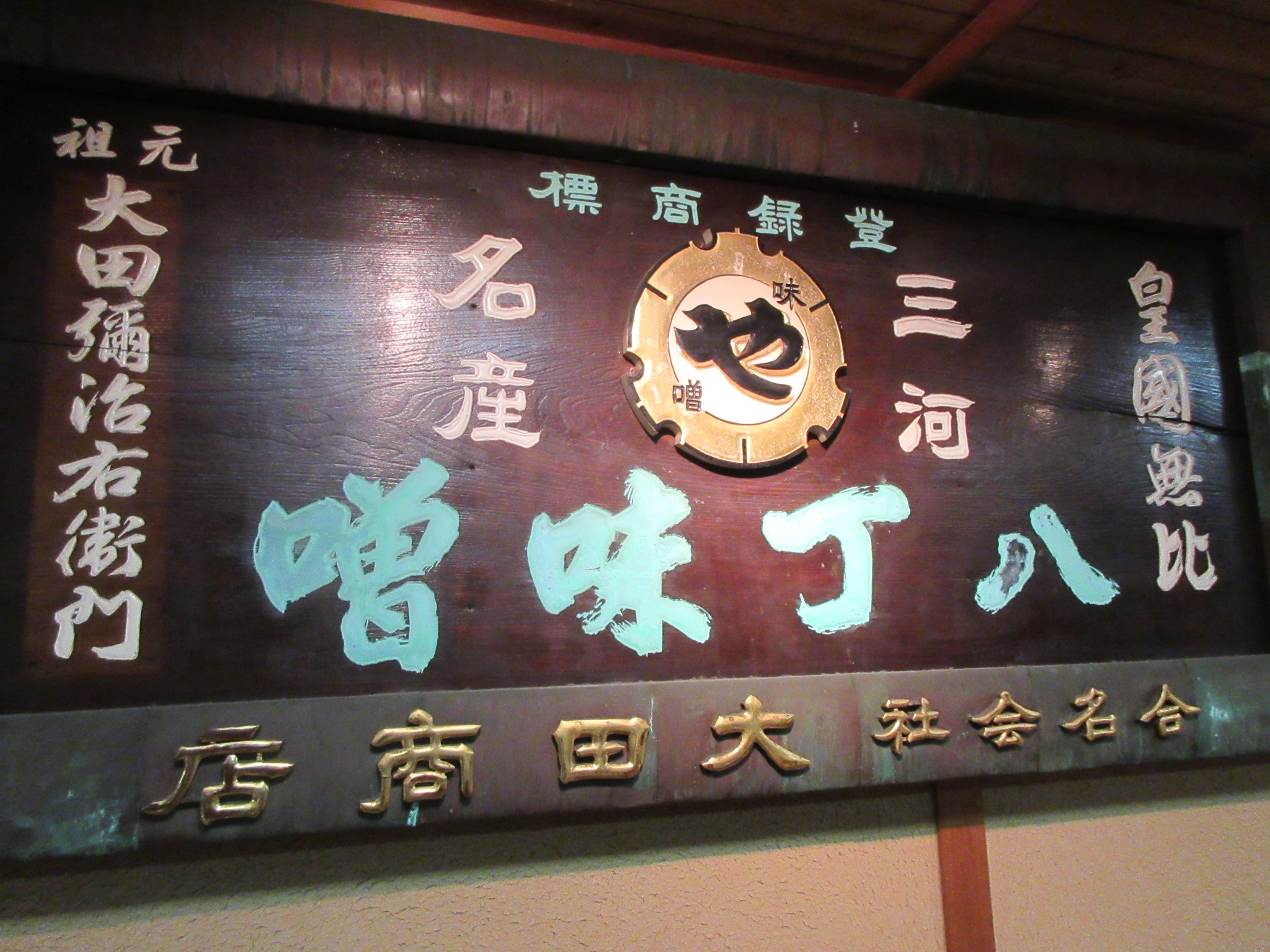 株式会社まるや八丁味噌（愛知県岡崎市）の旧社名、合名会社大田商店